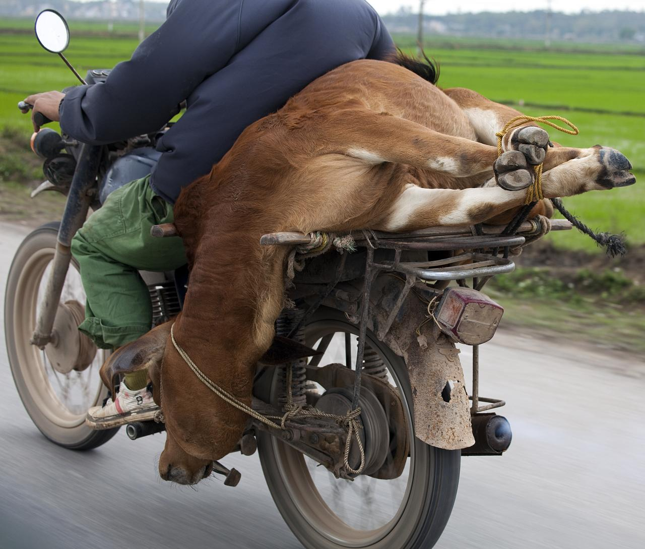 Bò vàng ở Việt Nam